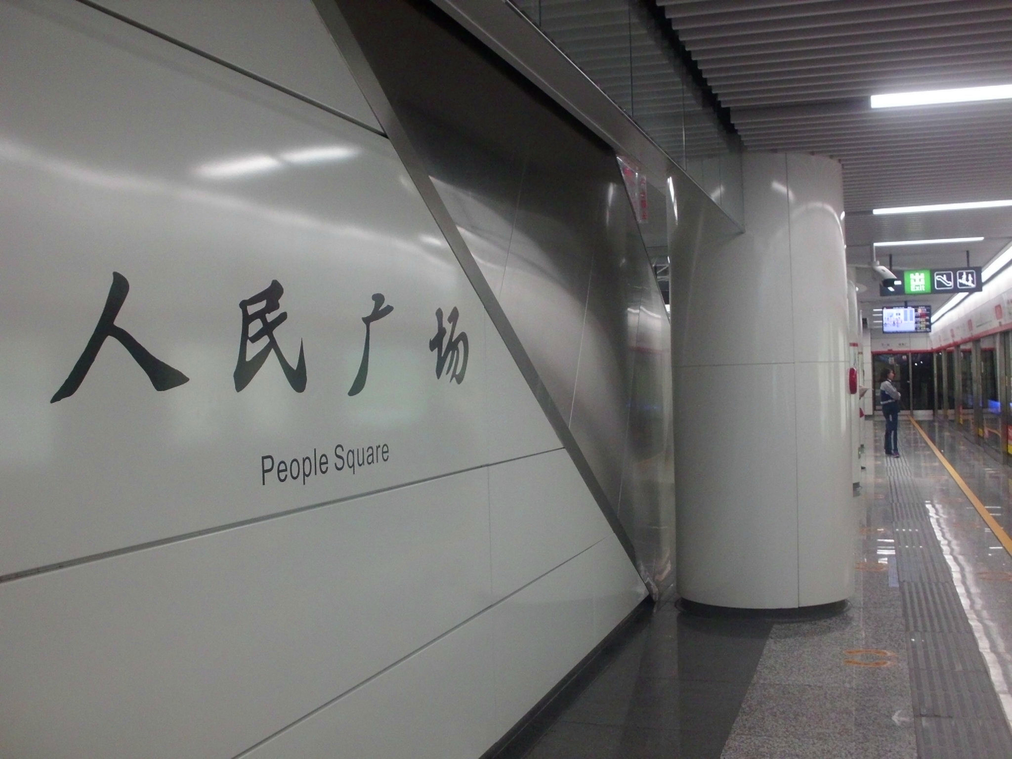 2号线人民广场站